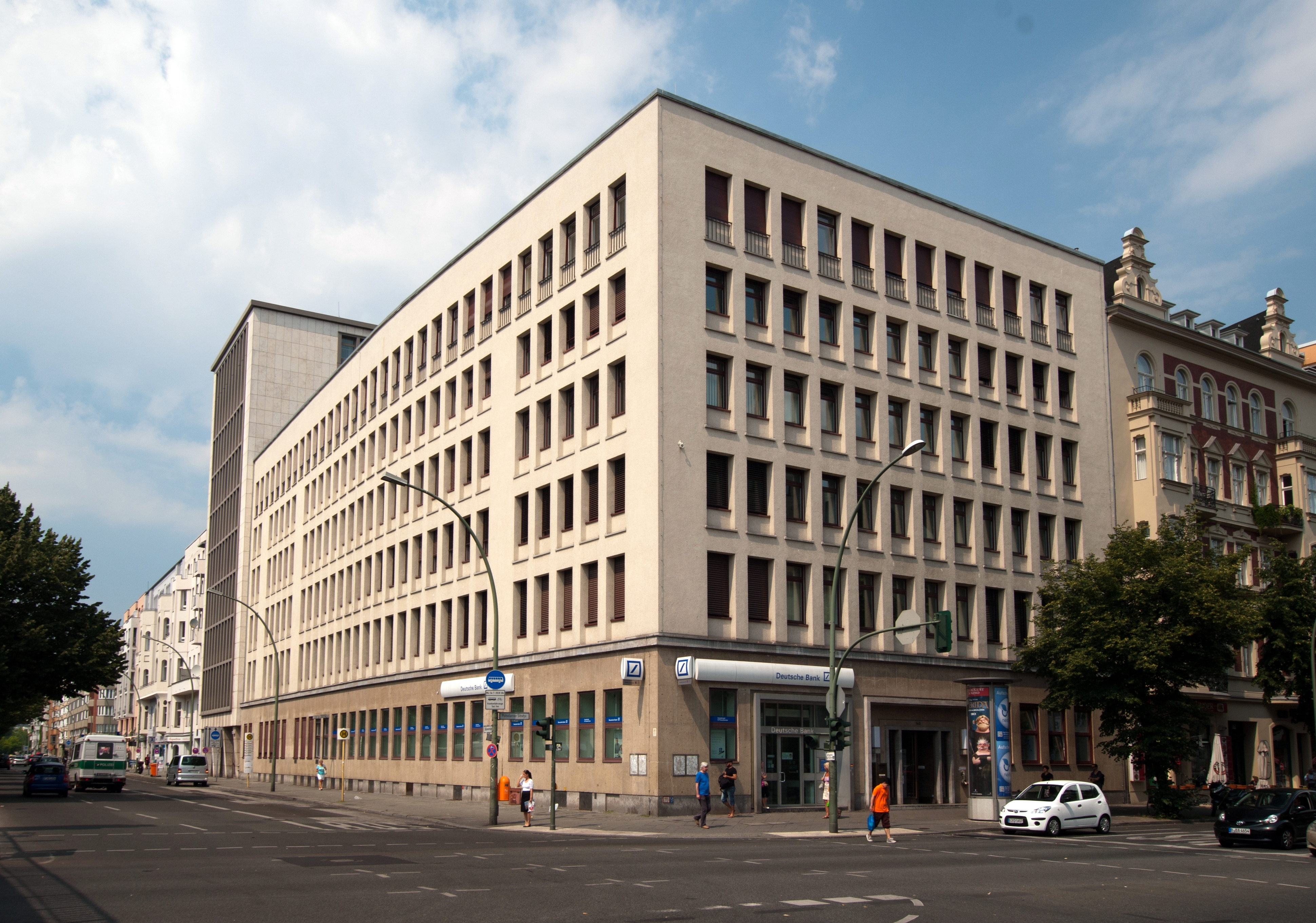 Finanzamt Schöneberg, Potsdamer Straße Ecke Bülowstraße in Berlin.